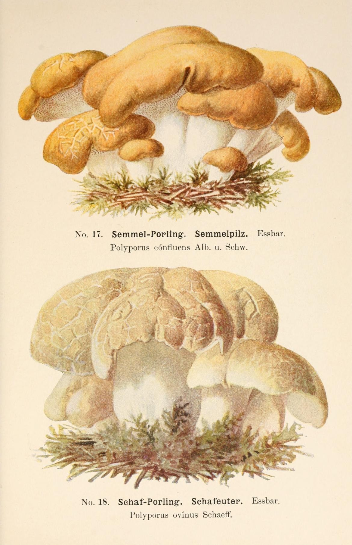 No. 17. Semmel-Porling. Semmelpilz. Essbar. Polyporus confluens Alb. u. Schw. , No. 18. Sehaf-Porling. Sehafeuter. Essbar. Polyporus ovinus Schaeif.